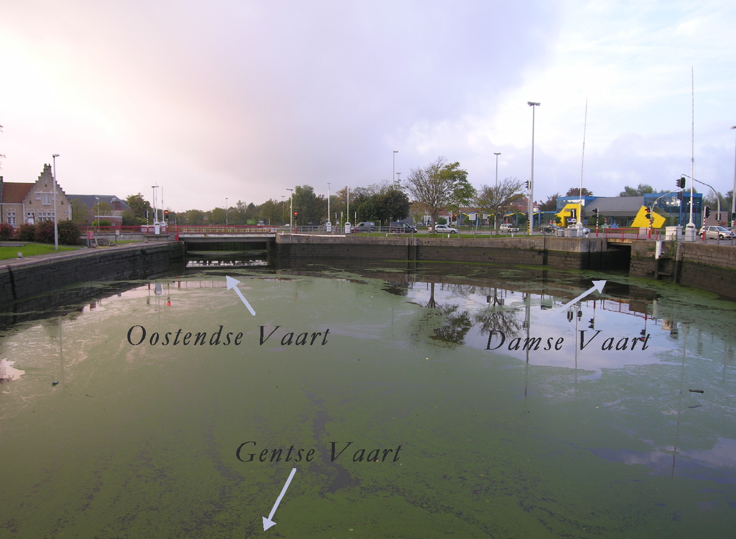 Bruges (Bèlgica): el Saskom, la resclosa d'evacuació dels canals de Damme, d'Oostende, de Gant i el canal interior de Bruges